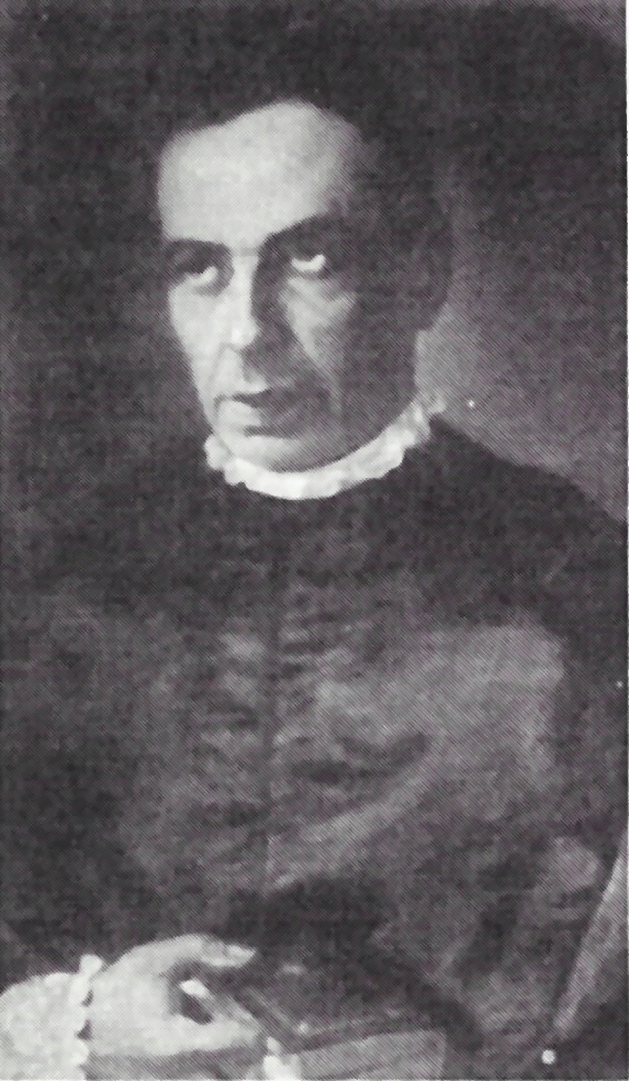 José Torres Padilla, confesor y director espiritual de santa Ángela de la Cruz.